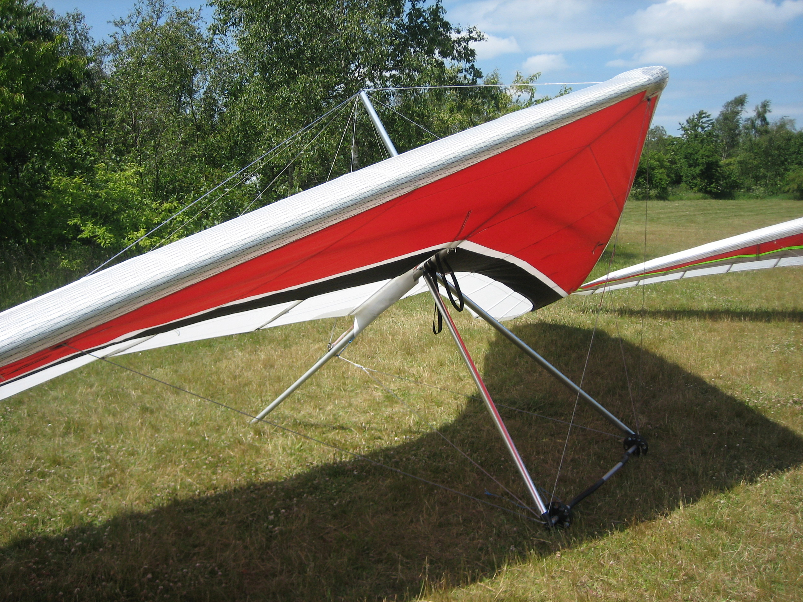 Moderne mellemstadie-drage. Dragen har 80% dobbeltsejl og skjuler dermed tværspærret inde i vingen.